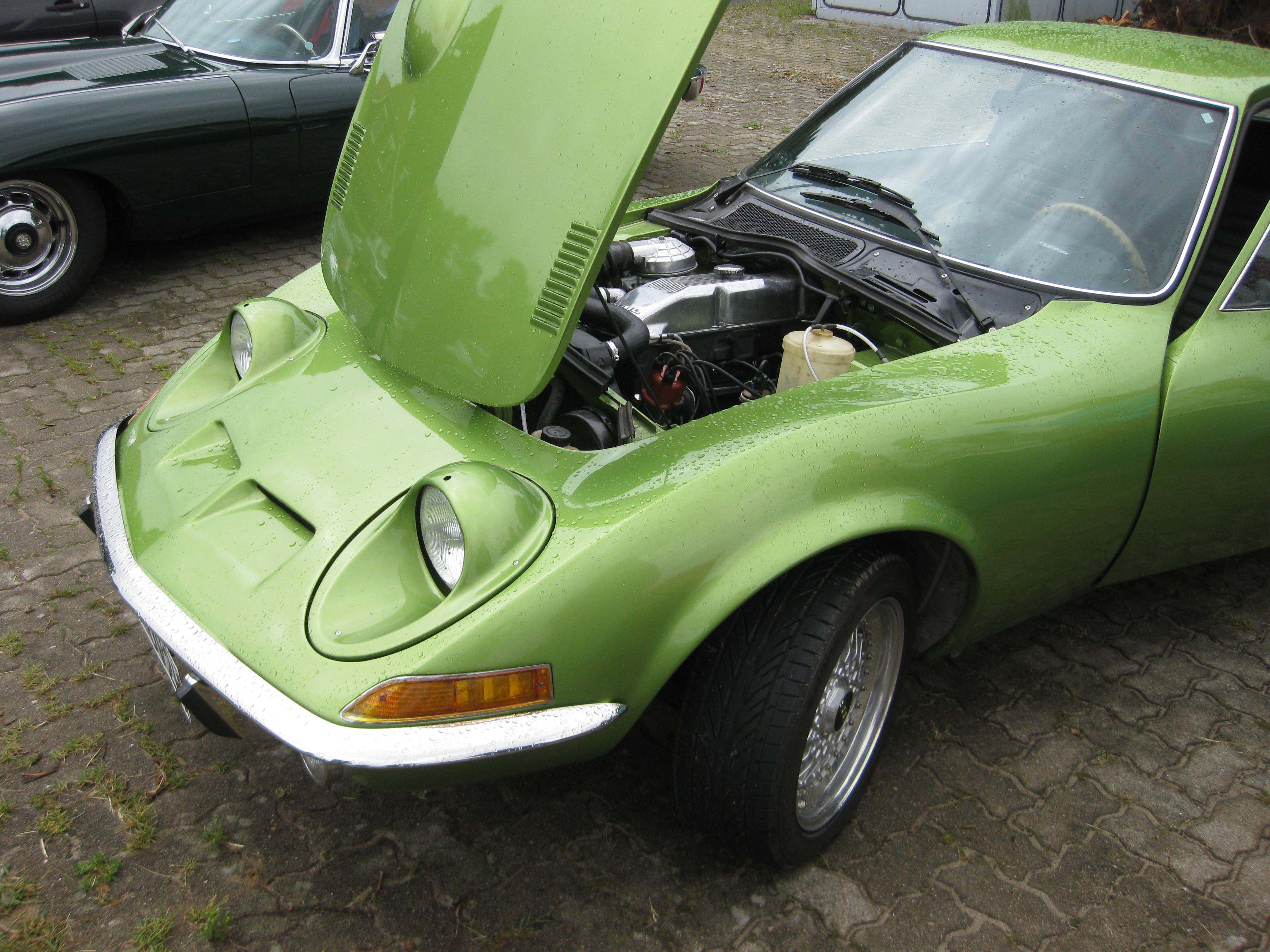 Opel GT mit offener Haube